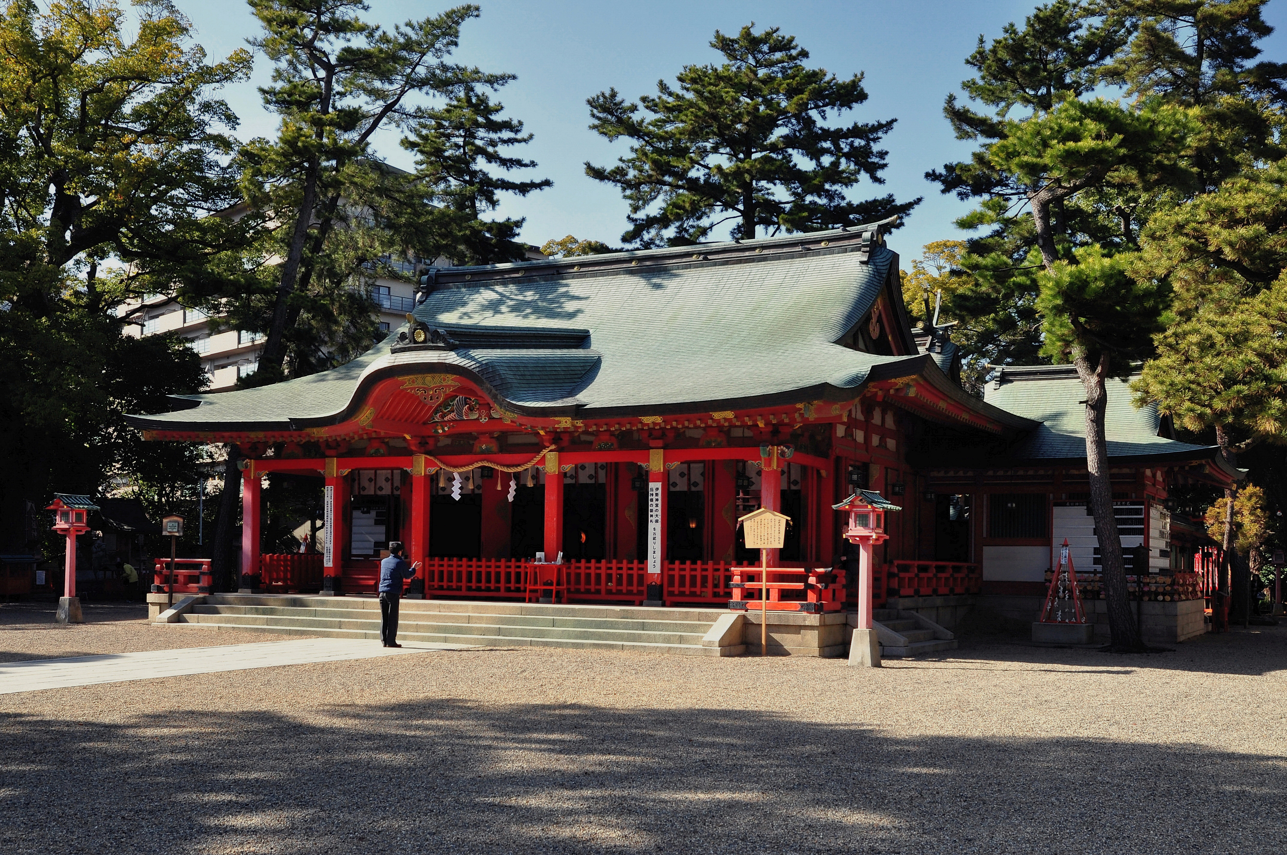 長田神社